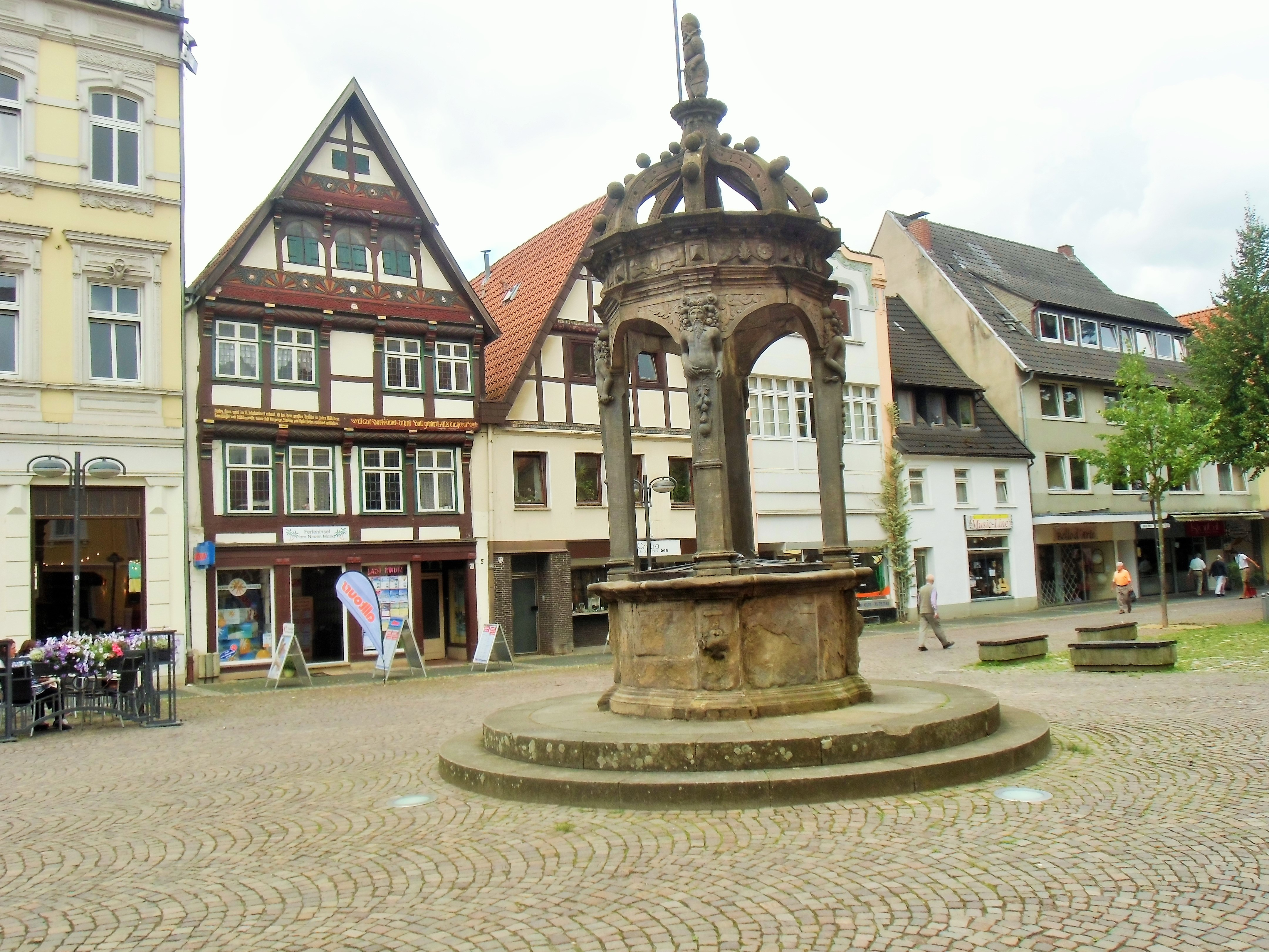 Denkmalgeschützter Renaissancebrunnen von 1599 auf dem Neuen Markt in Herford